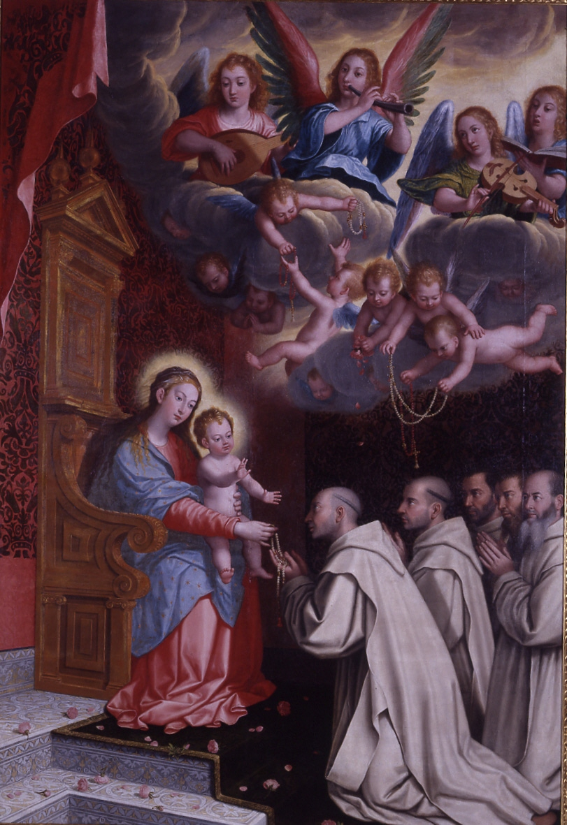 La obra representa a la Virgen del Rosario apareciéndose a San Bruno, el fundador de la Orden de los Cartujos.